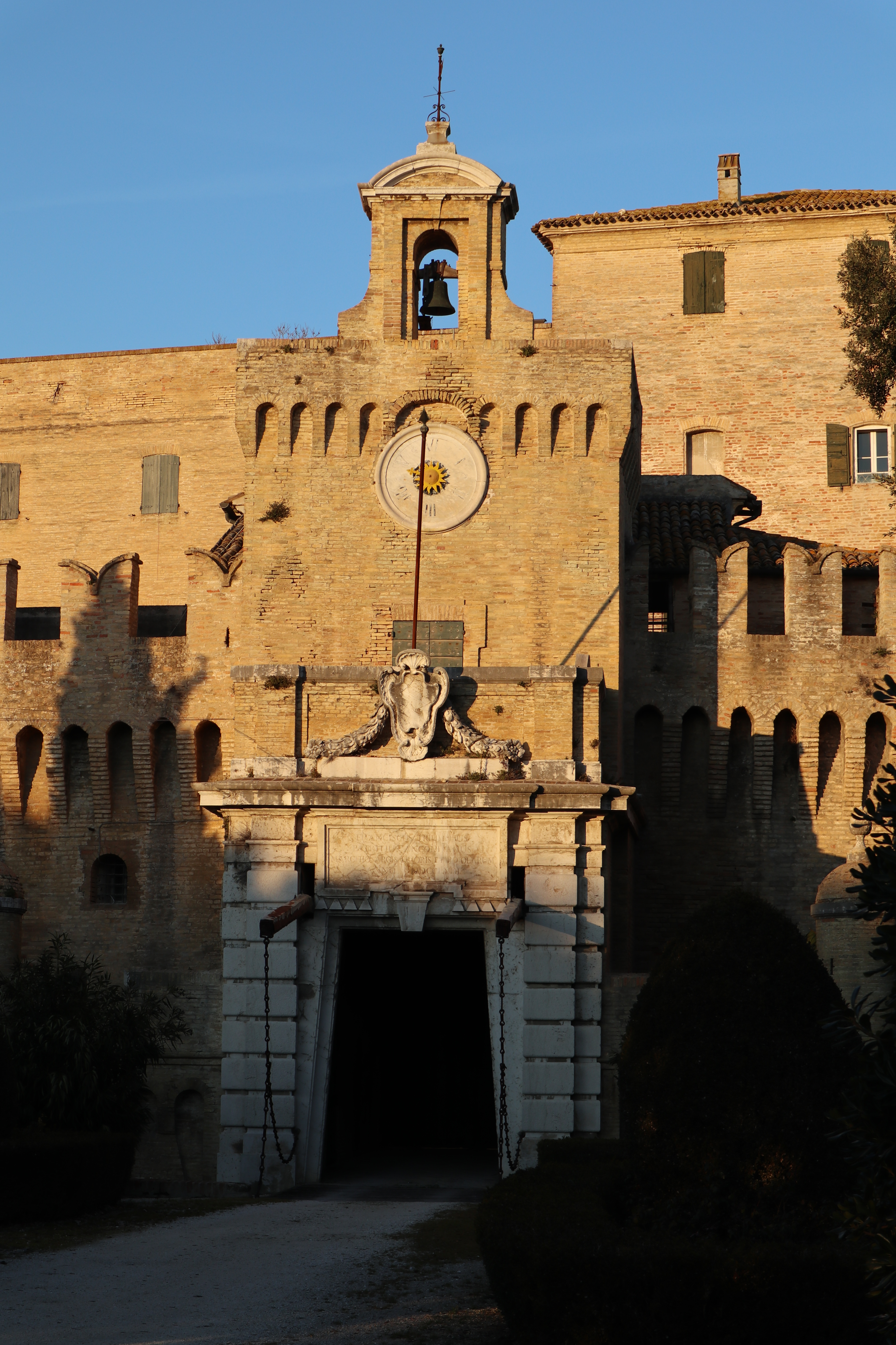 Eretto dagli jesini a partire dal 1194, in seguito conteso con Ancona e infine trasformato in dimora signorile dai marchesi Trionfi a partire dal 1757.